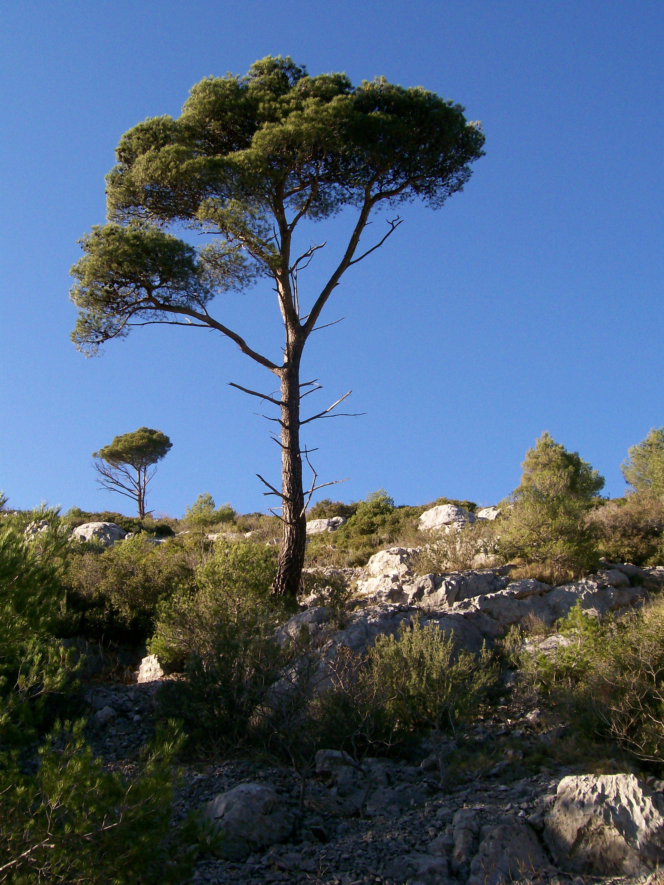 Calanques zwischen Marseille und Cassis.